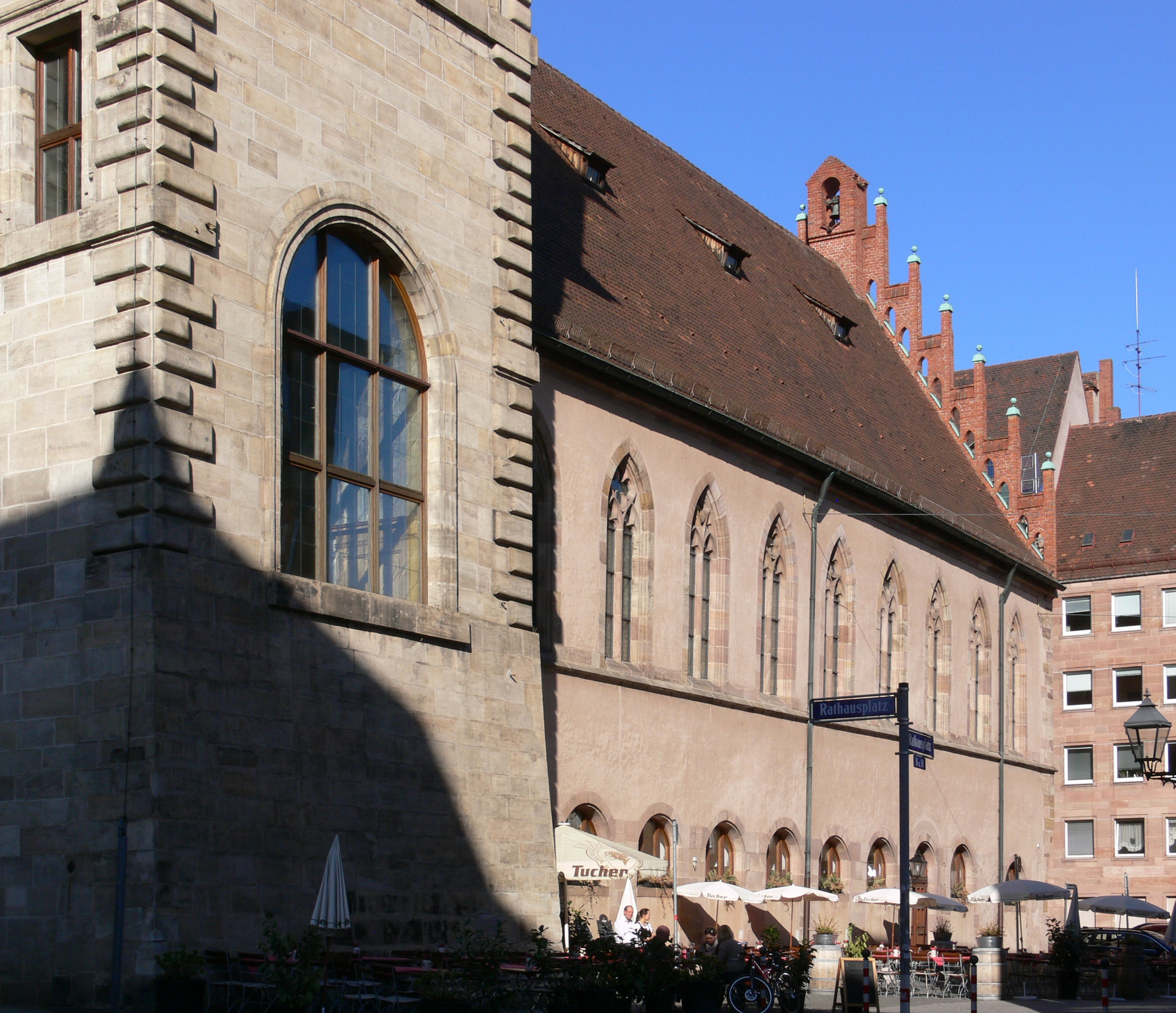 Nürnberg, Altes Rathaus